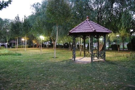 گرفته شده توسط شهرداری محترم/بارگزاری ع.الف